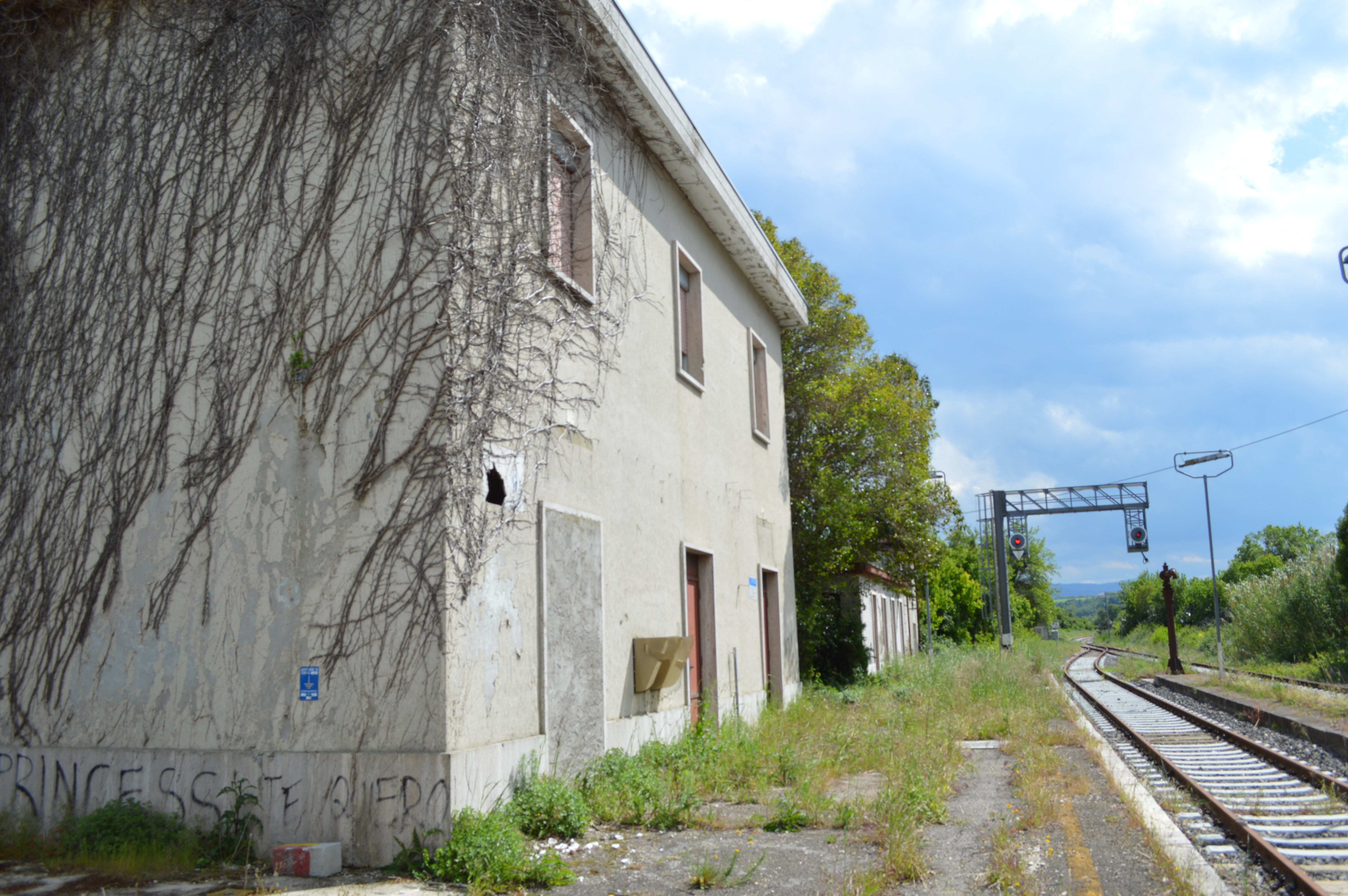 Stabile (ex-chiusa) Stazione Ferroviaria (fs) San Martino in Pensilis (CB)veduta direzione binario Campobasso